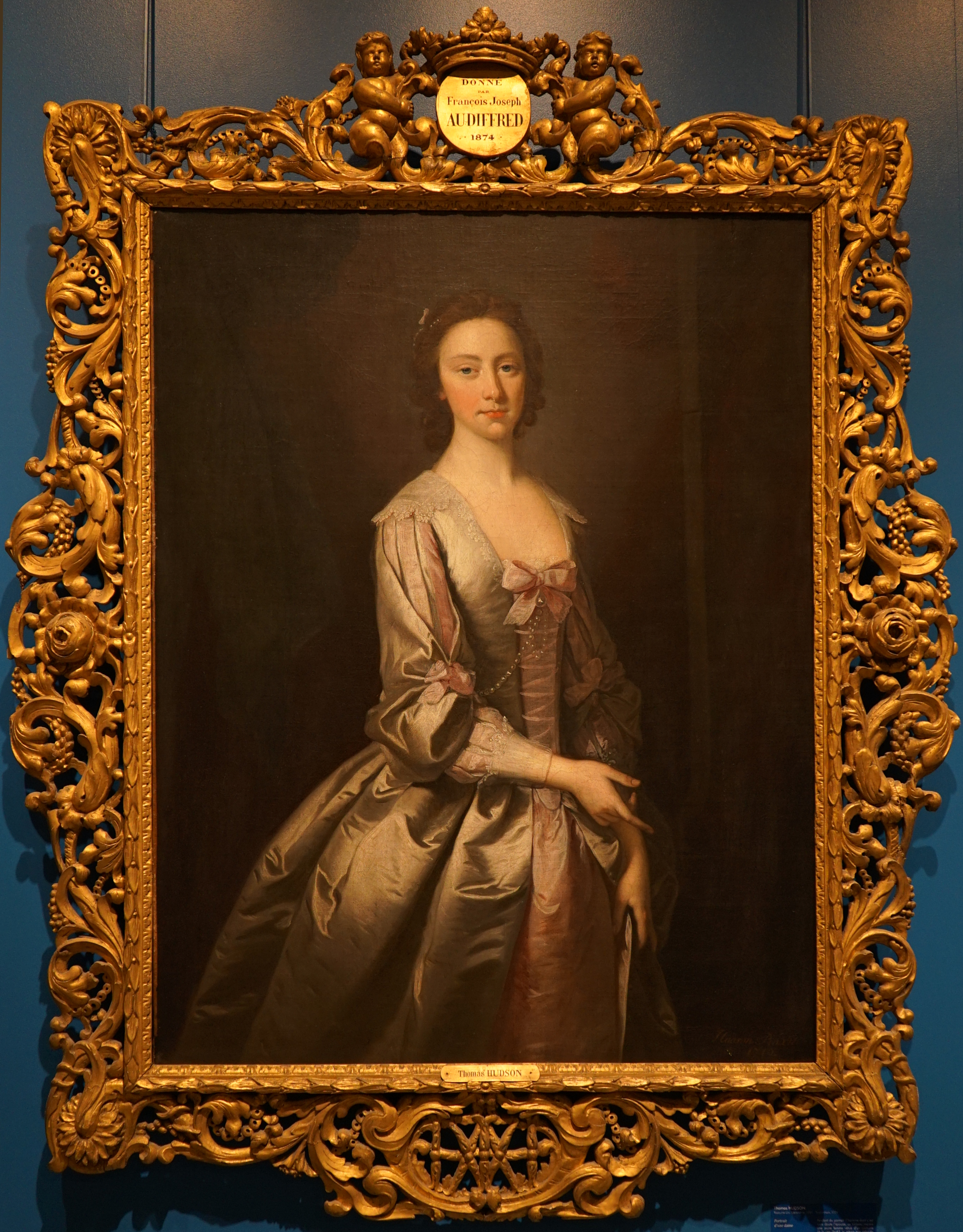 dans le département peintures.